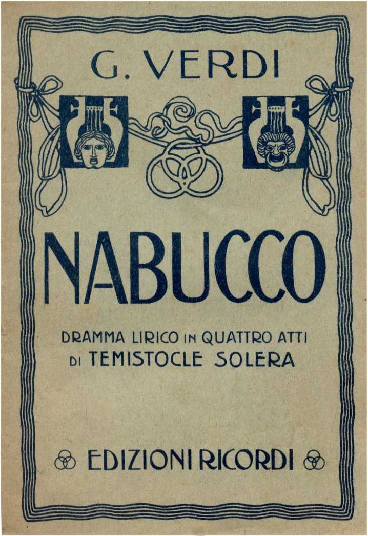 Copertina libretto "Nabucco" dramma lirico in quattro atti di Temistocle Solera musica di Giuseppe Verdi - edizioni Ricordi